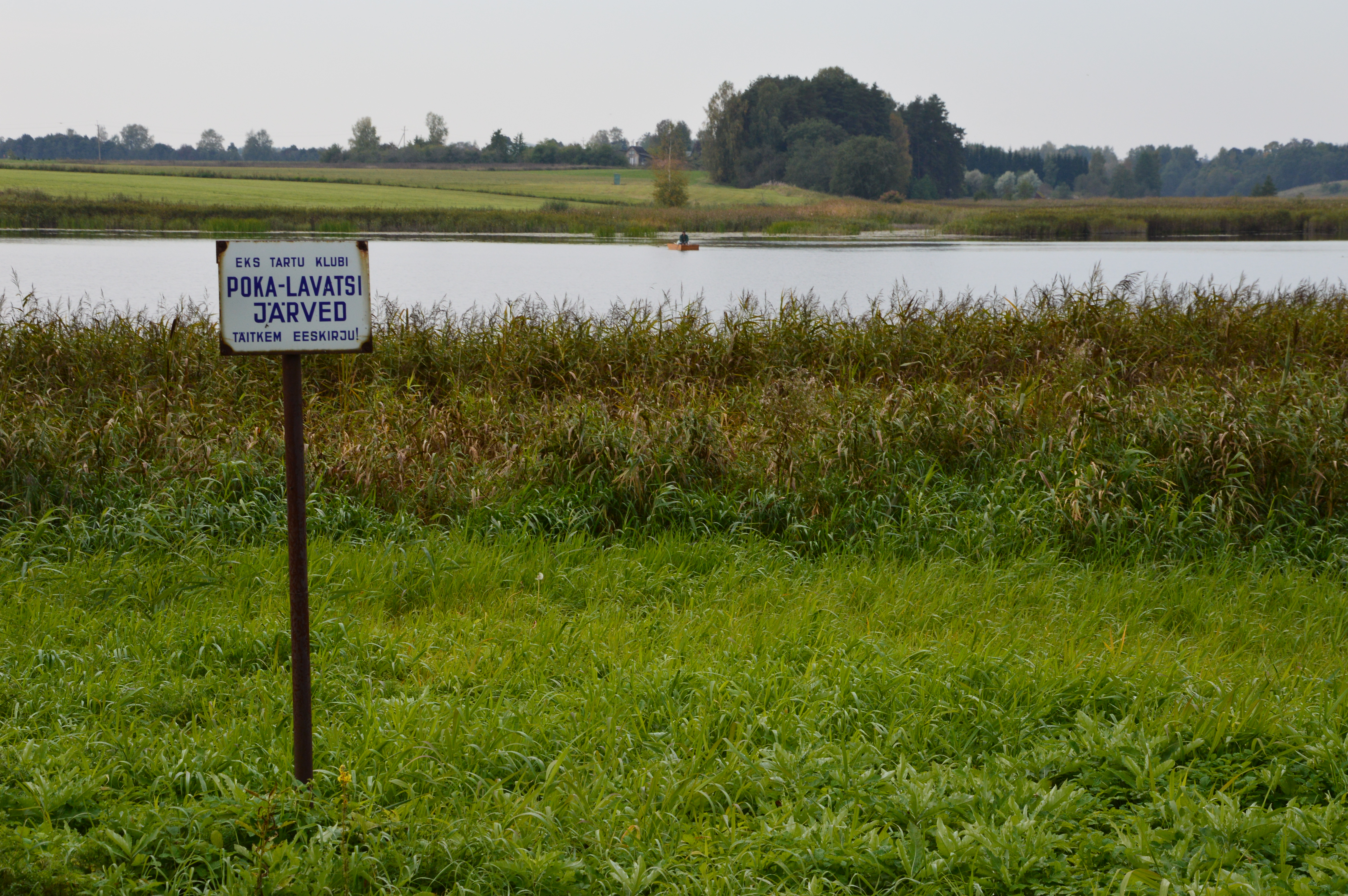 Lavatsi järv Poka külas.